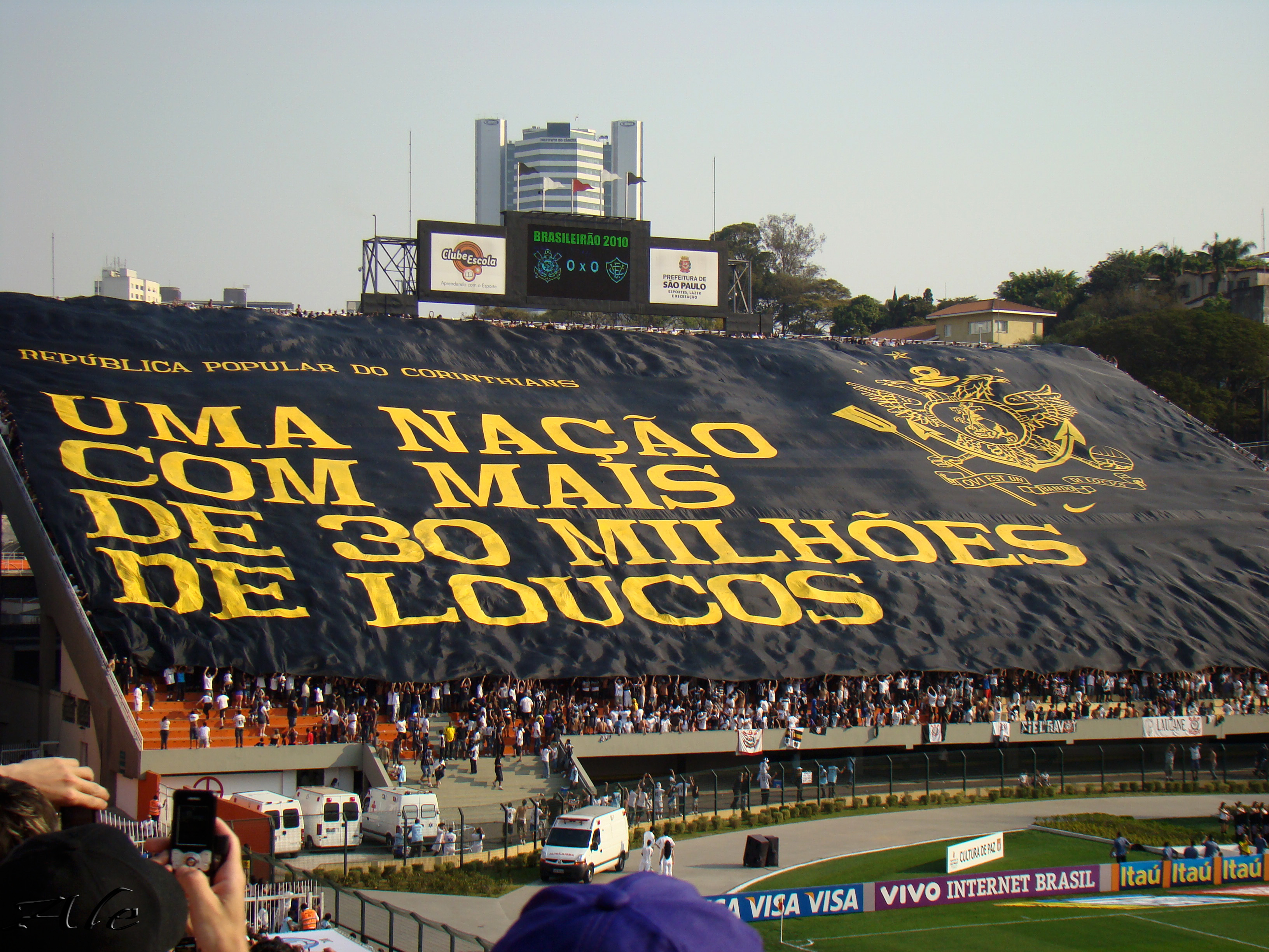 Bandeira da República Popular do Corinthians.